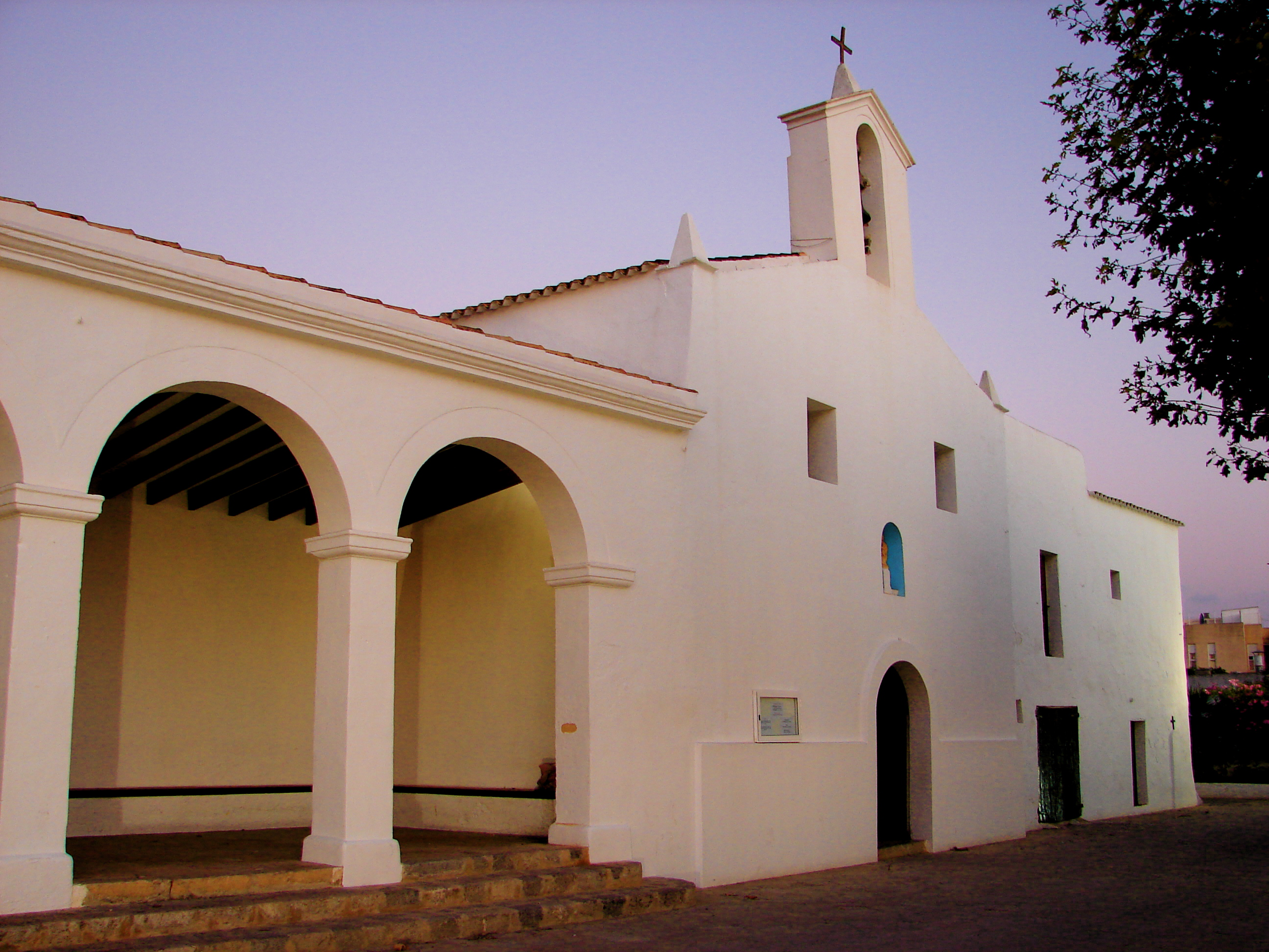 Església de Jesús